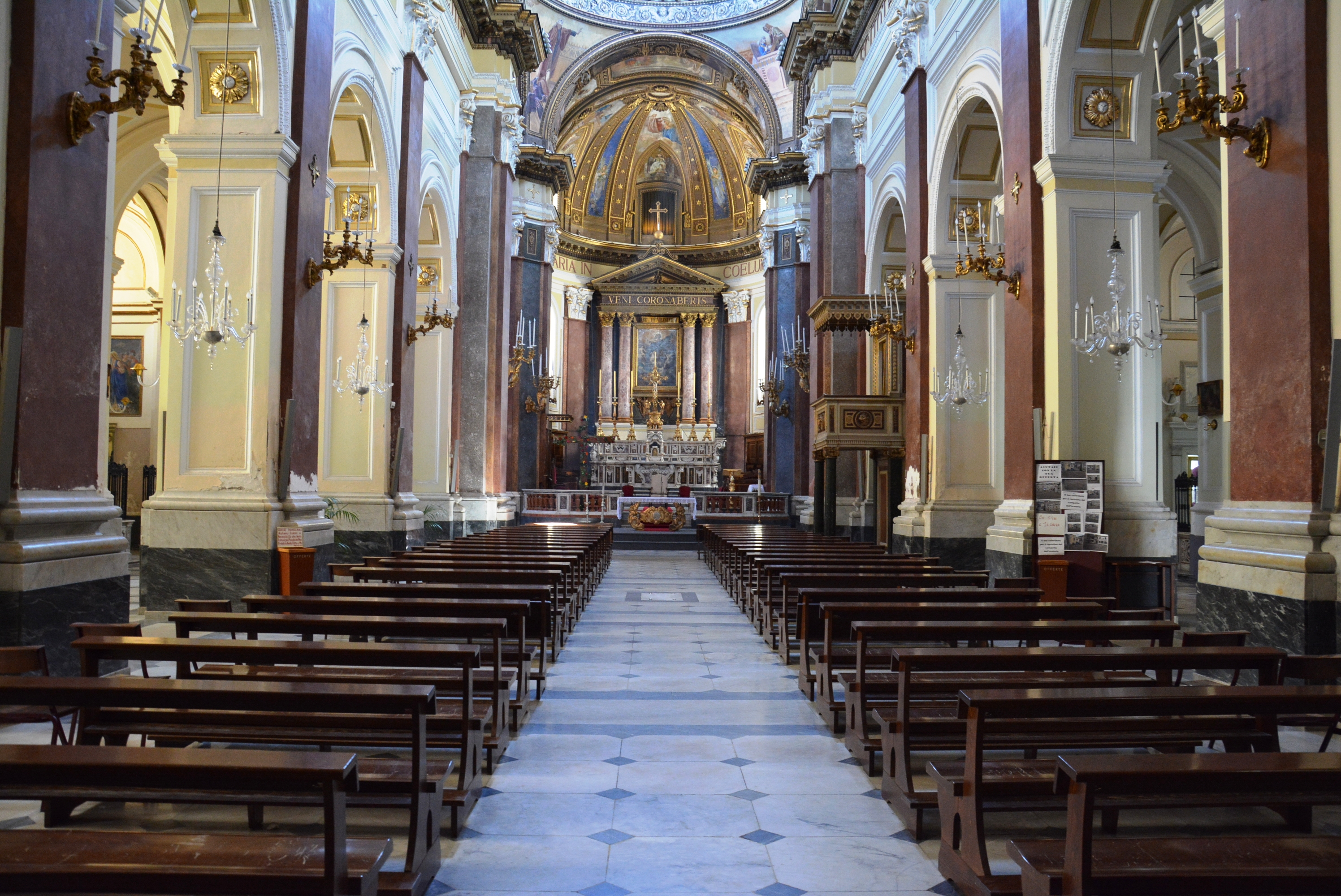 Concattedrale di Maria Santissima Assunata a Castellammare di Stabia